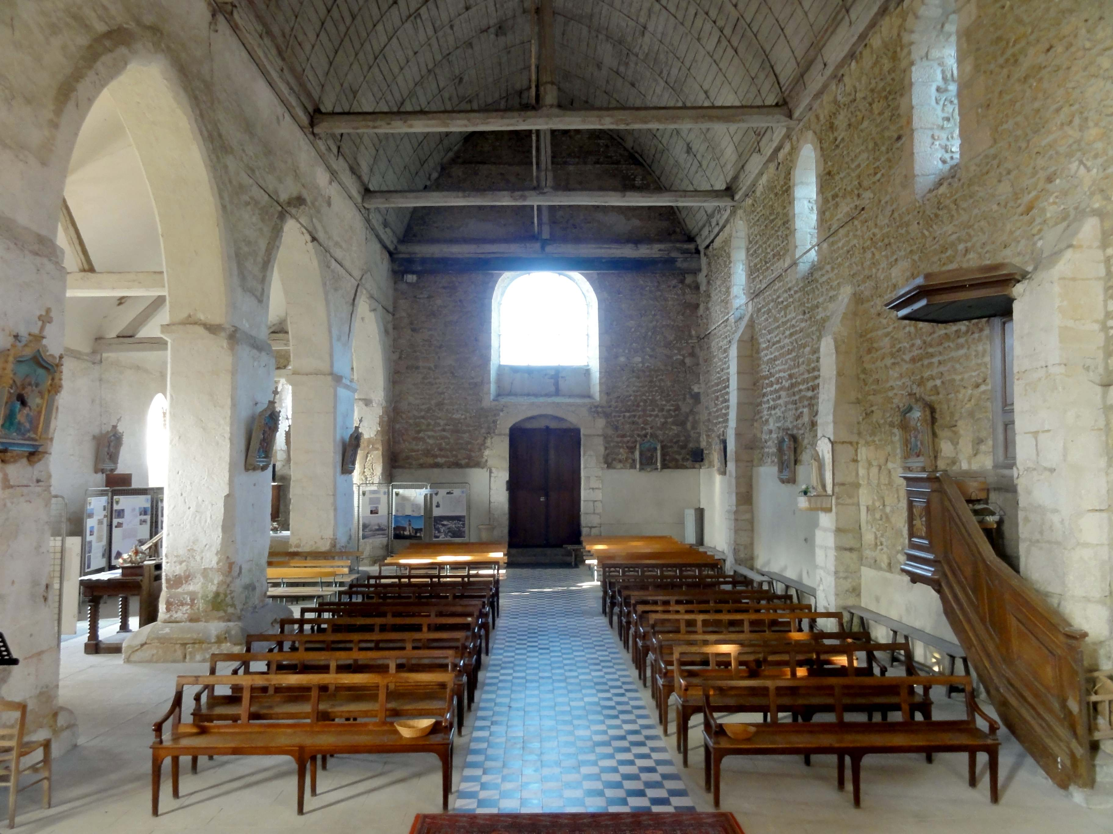 Intérieur de l'église - voir de l'église.